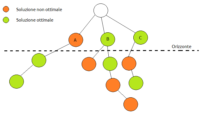 Grafo (Albero) su cui viene effettuata una ricerca in profondità con taglio. L'algoritmo di ricerca non potendo vedere oltre l'orizzonte cioè la profondità massima fissata, effettuerà una scelta apparentemente migliore ma che si rivelerà una soluzione non ottimale.